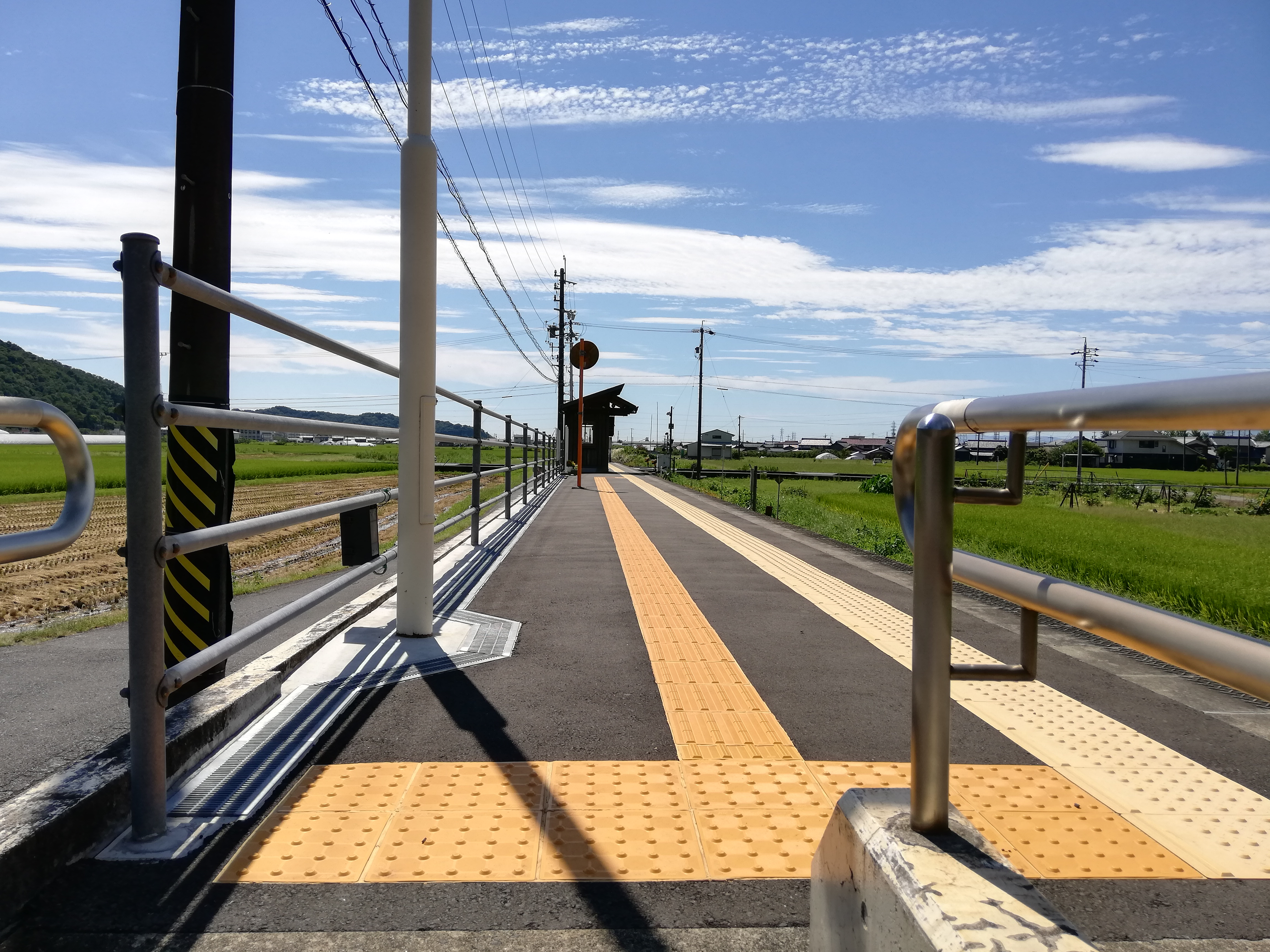 樽見線の織部駅。